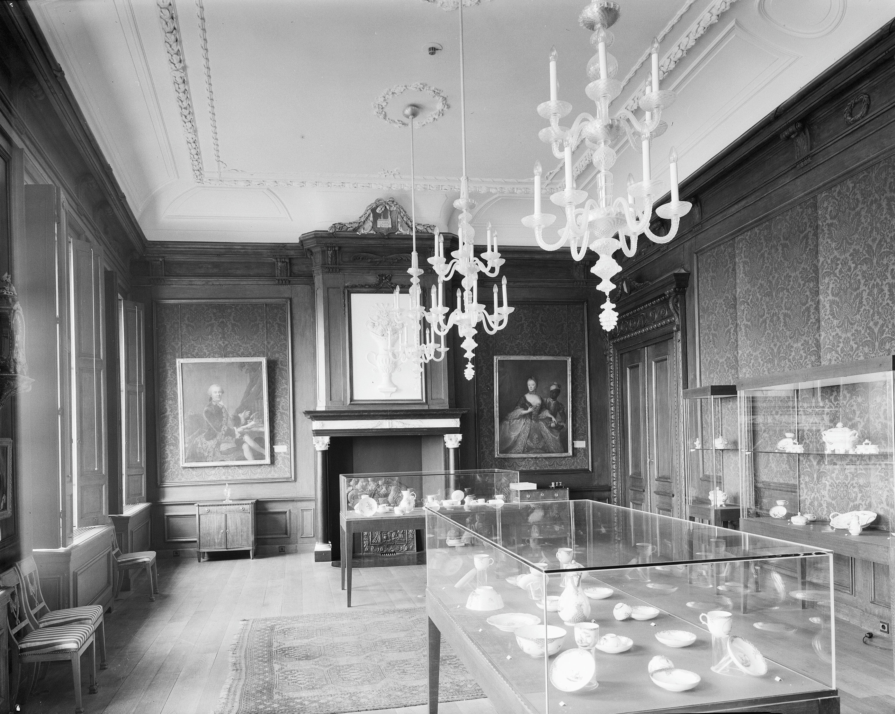 raadhuis - stadhuis: interieur museum zaal